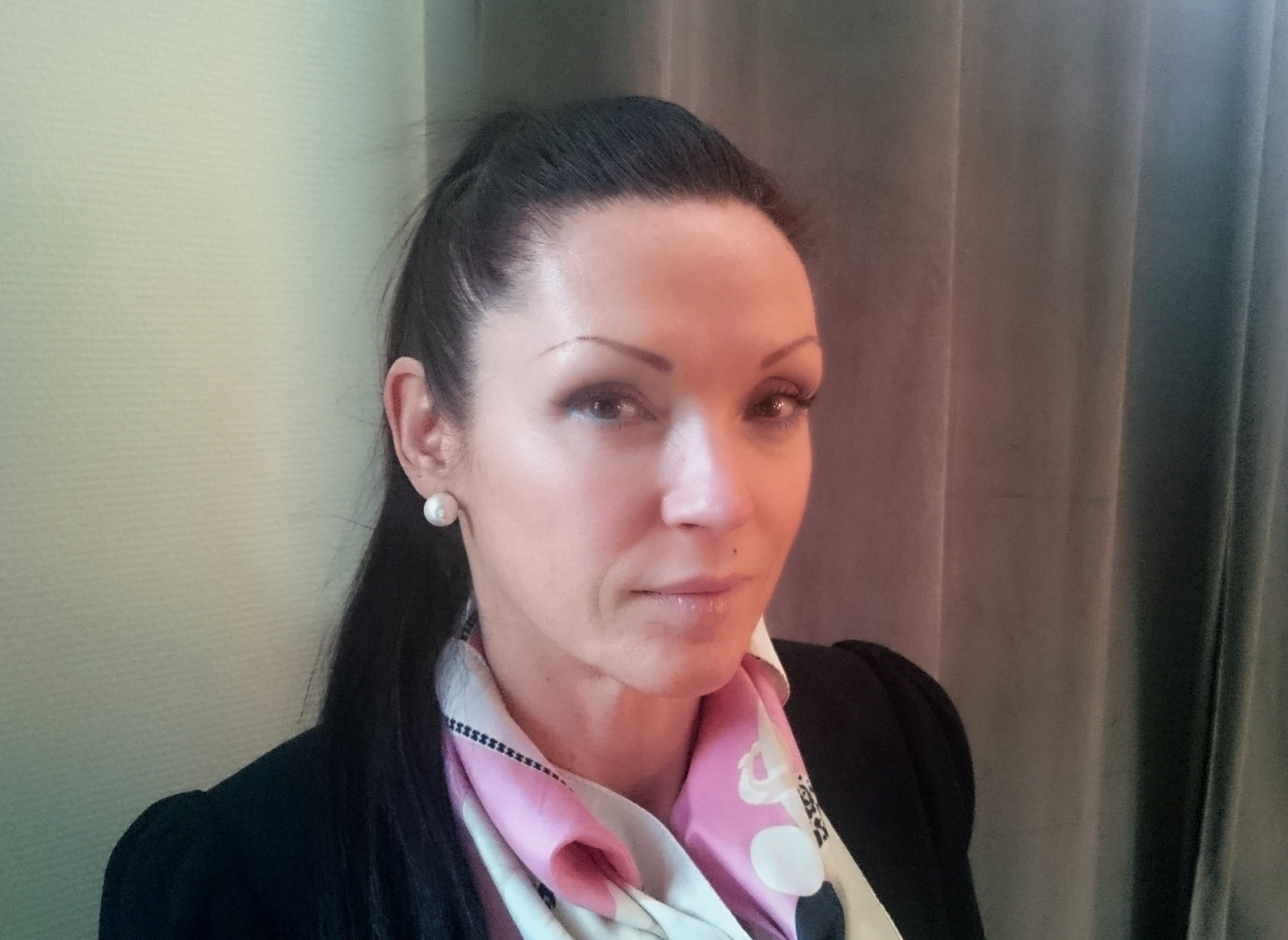 Isabella de Salareff i mars 2015.